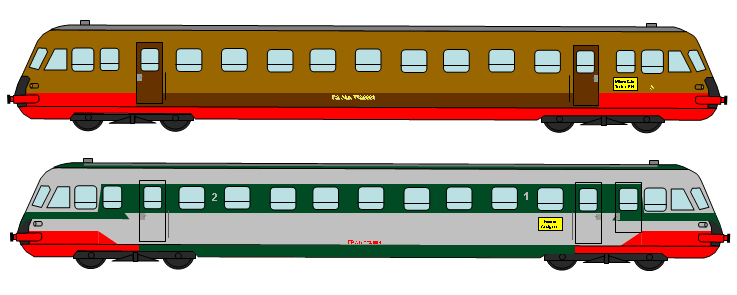 ALn 772 delle Ferrovie dello Stato (sopra) e delle Ferrovie Padane (sotto)